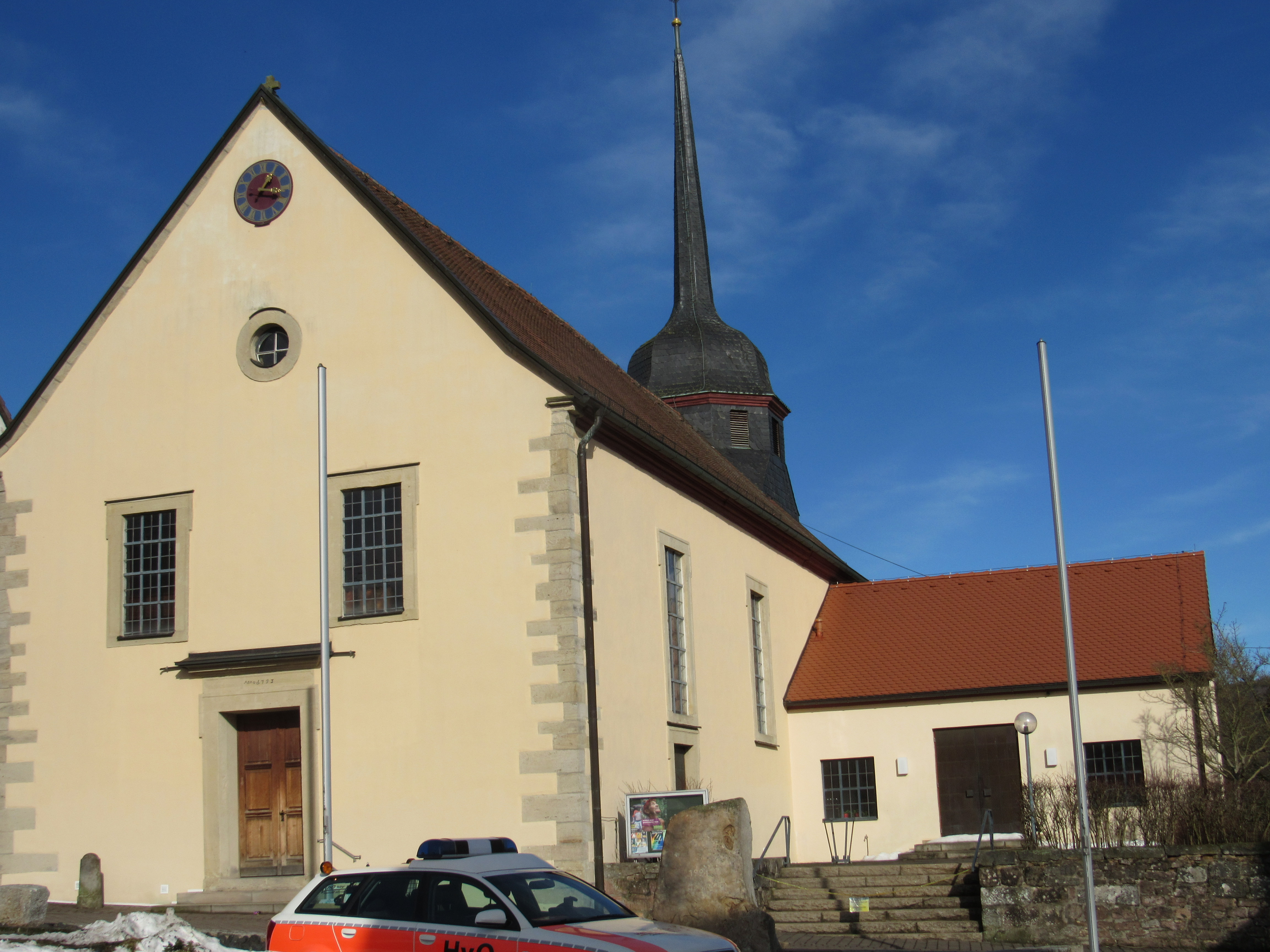 Die Kirche in Kothen, Gemeinde Motten